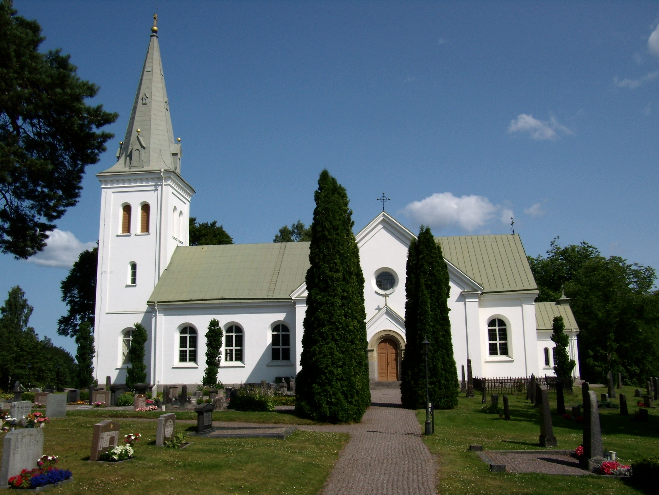 Dalhems kyrka, Småland